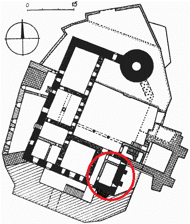 Kaple a jeji pudrys